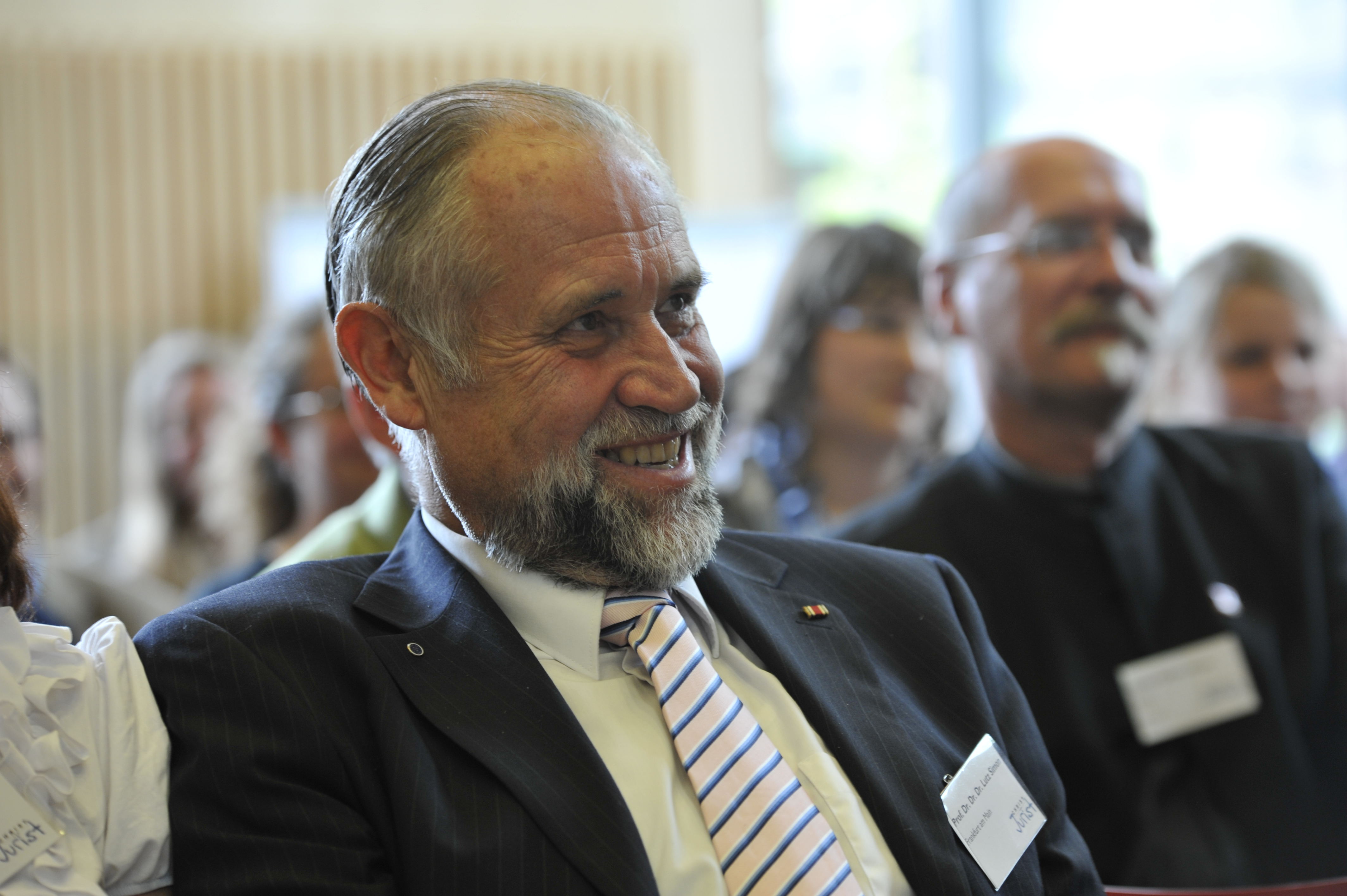 Lutz Simon, Jurist und Vize-Präsident des Verbandes der Europäischen Rechtsanwaltskammern bei der Tagung "Christ und Jurist" am 5. Mai 2012 in Frankfurt am Main